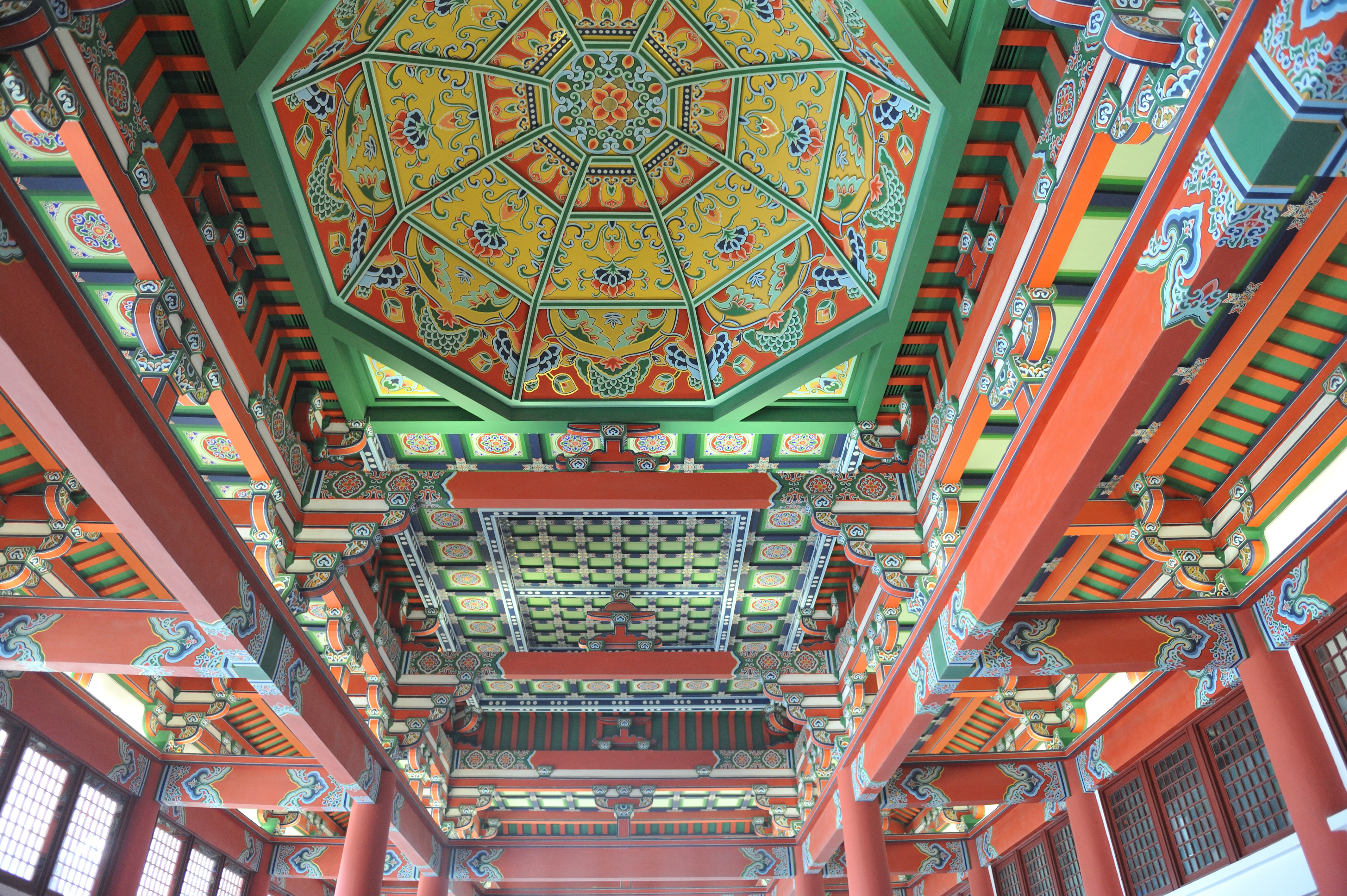 南京博物院大厅藻井